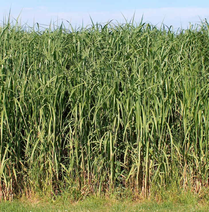 Chinaschilf (Miscanthus sinensis) auf einem Versuchsfeld